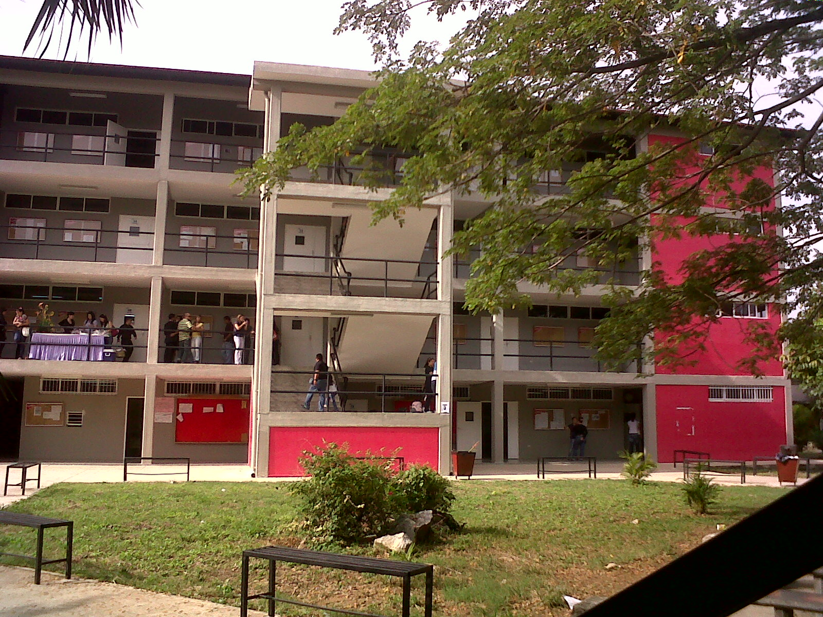 Edifico de aulas del área de odontología de la UNERG en San Juan De Los Morros.